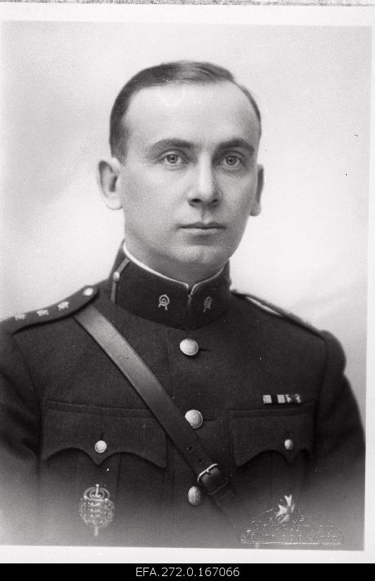 Sõjaväe Ühendatud Õppeasutuste Sõjakooli kuulipildurite kompanii ülem kapten Alfred Luts 1930. aastal